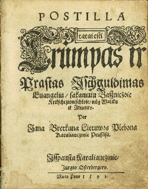 Jono Bretkūno Postilė. Postil of Jonas Bretkūnas